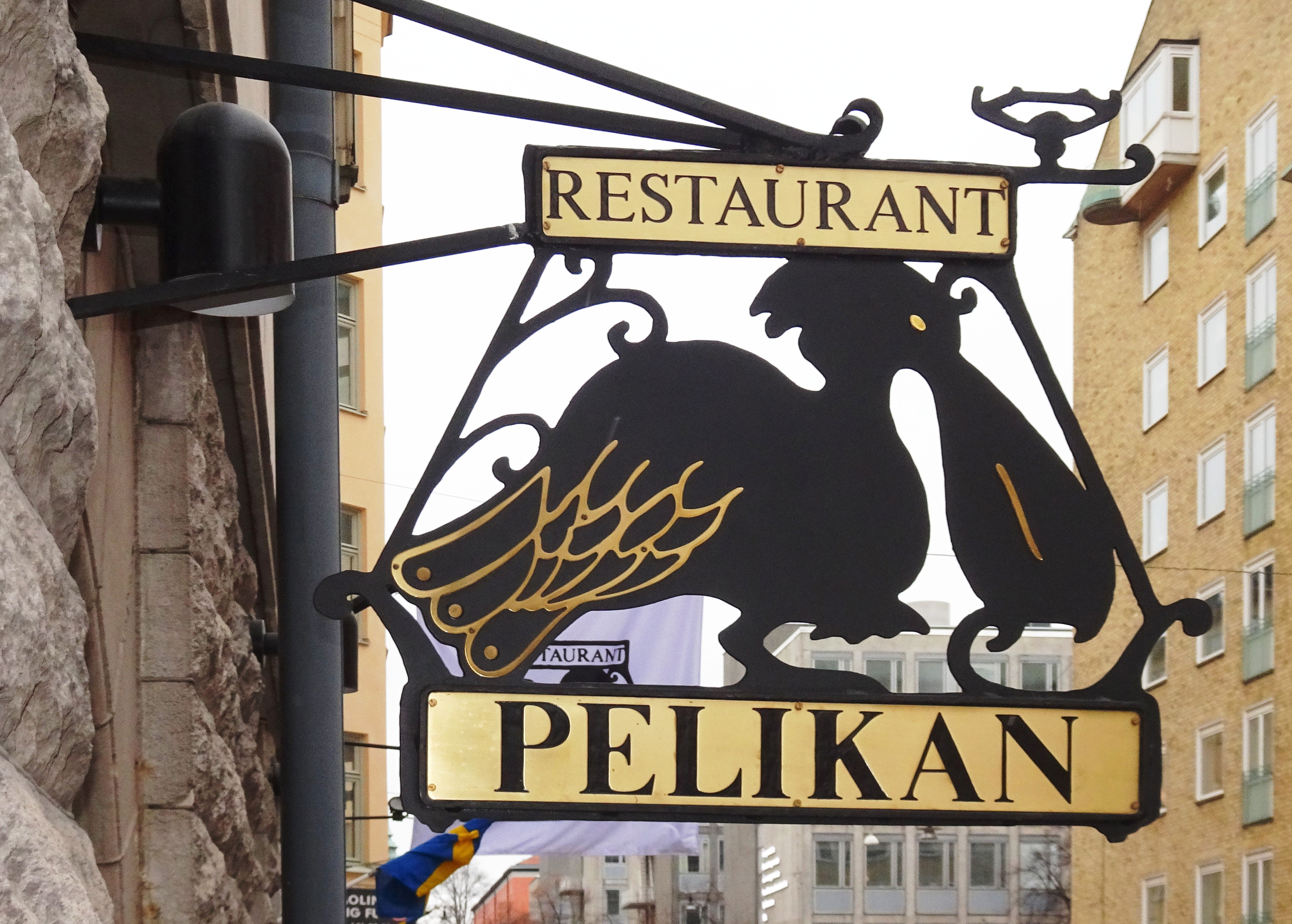 Restaurang Pelikan, skylt